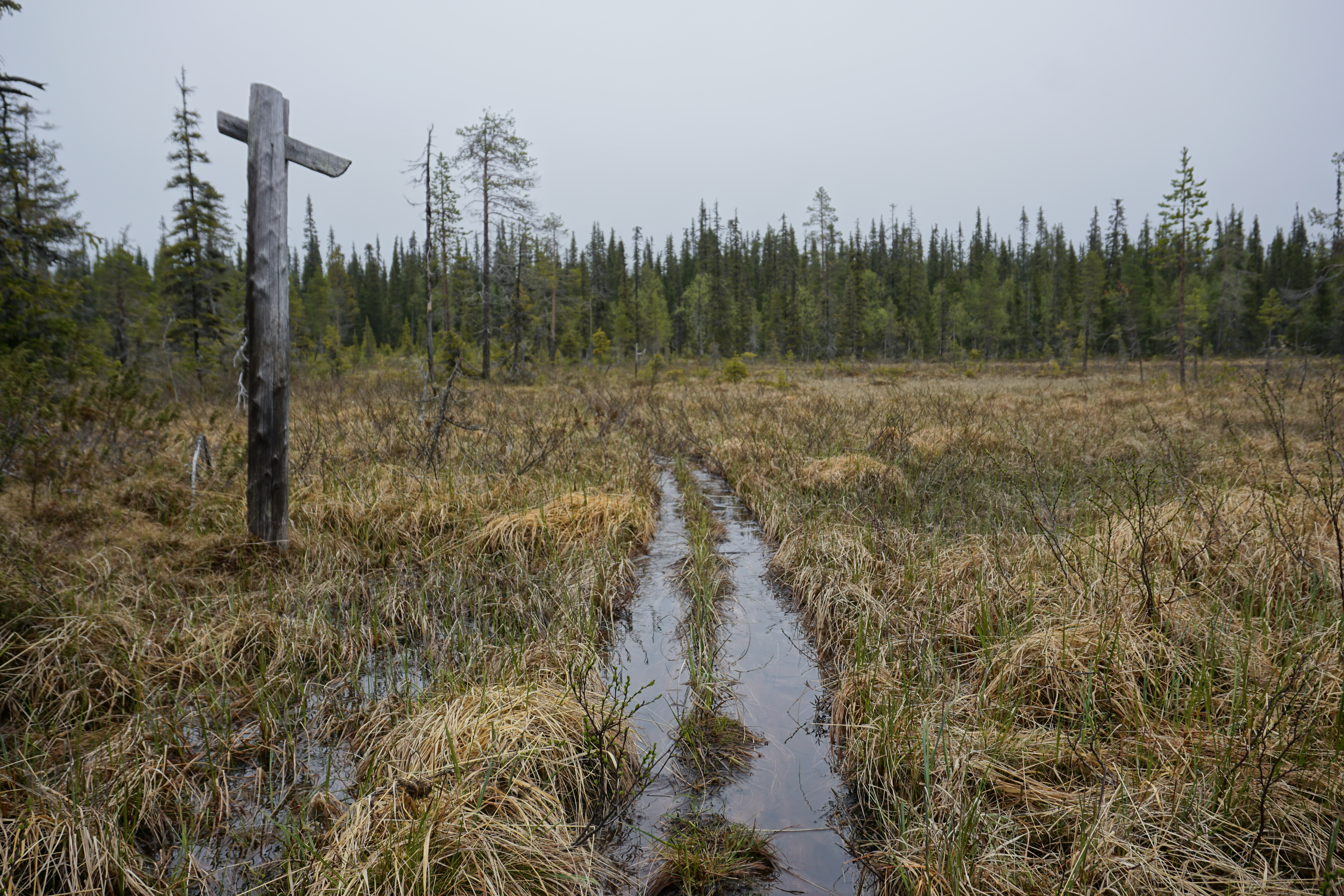 Ruijanpolku; historical road in Finland